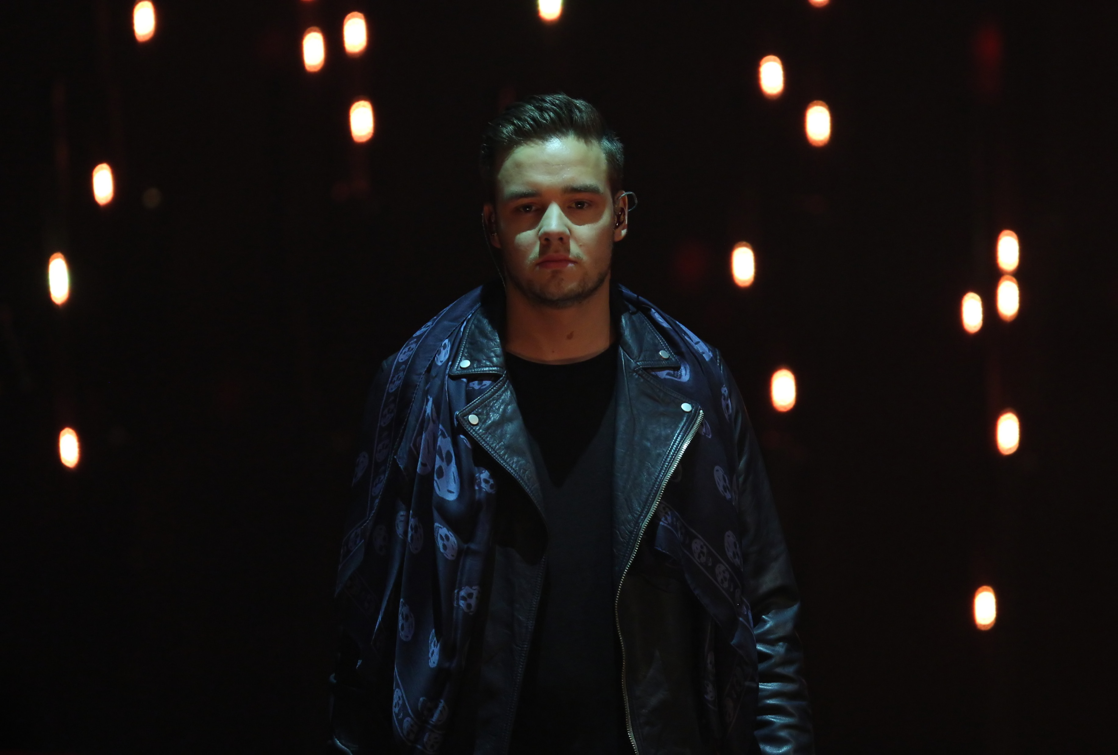 Wetten, dass.. ? 214. show in Graz, 8. Nov. 2014 Liam Payne at 214. Wetten, dass.. ? show in Graz, 8. Nov. 2014